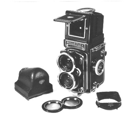 Rolleiflex, een van de bekendste middenformaatcamera's uit de 70-er jaren en daarvoor. Hier de specialistische groothoekversie, de "Rolleiwide". Foto: Jan Weijers.